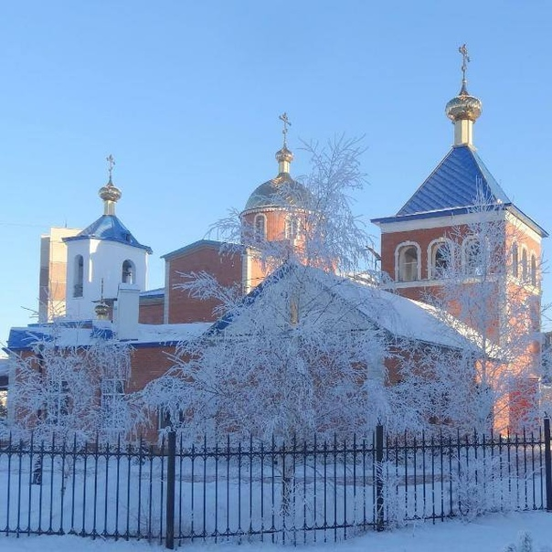 Храмовый комплекс святого Елевферия Римского